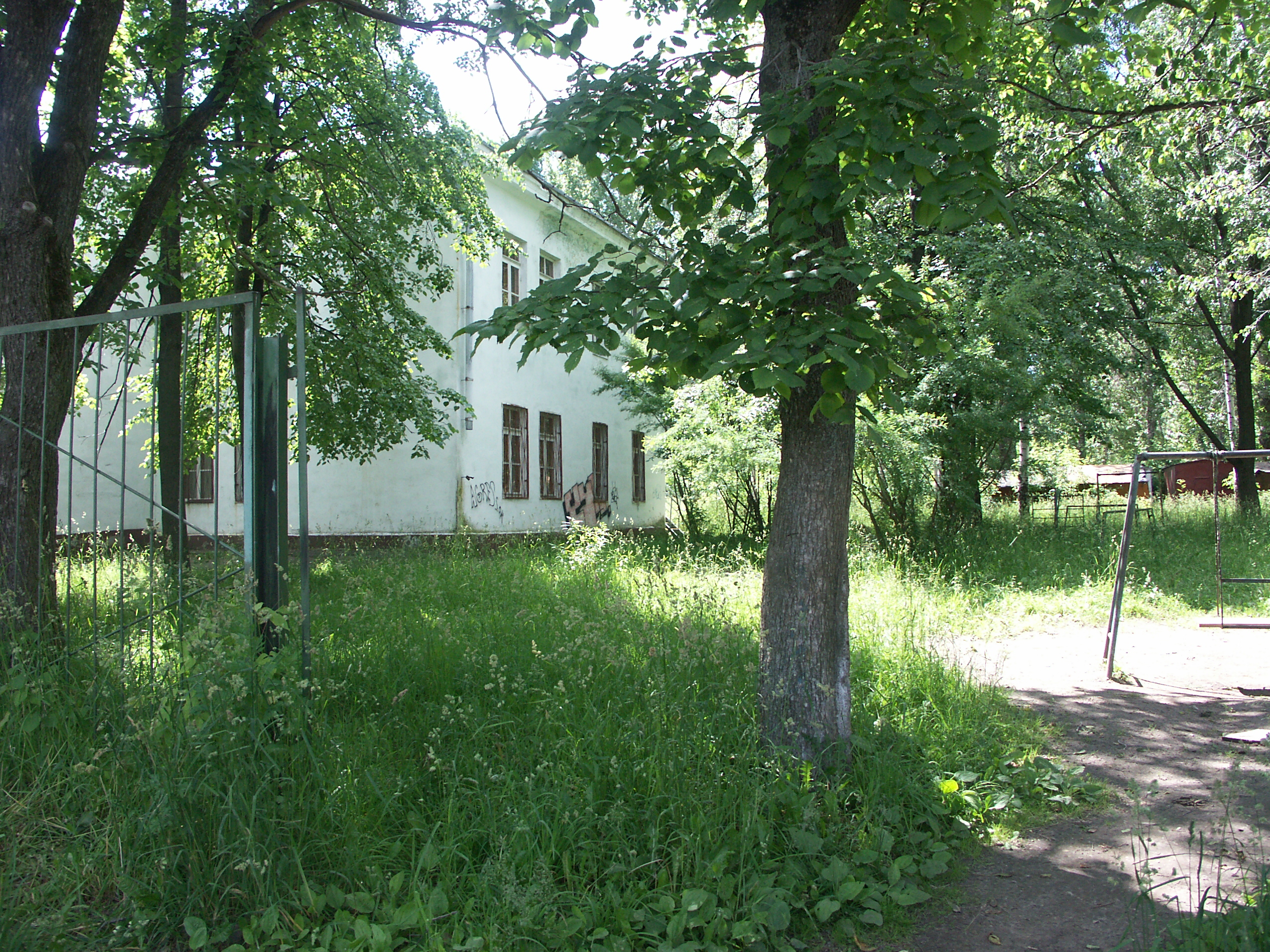 Детсад в Норском (Ярославль) рядом с 60-й школой.